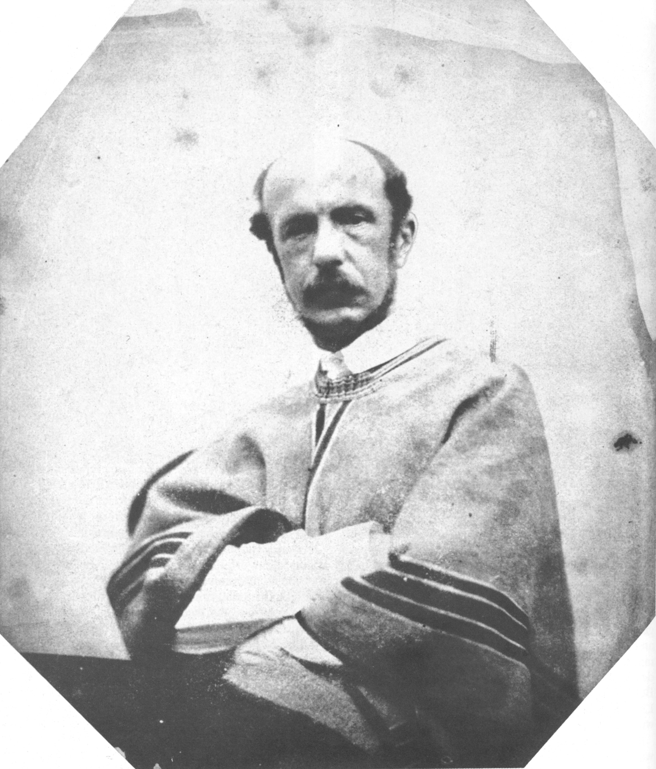 Johann Moritz Rugendas (1802-1858), älteste Photographie Franz Hanfstaengls